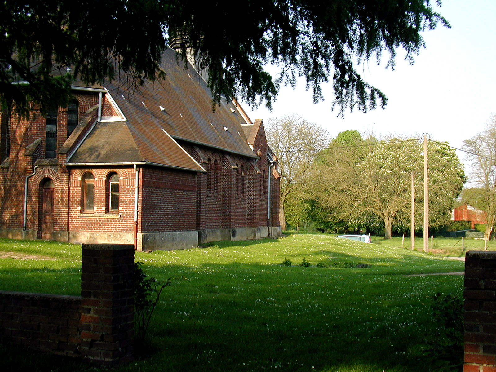 Bazentin (Somme, Picardie, France)